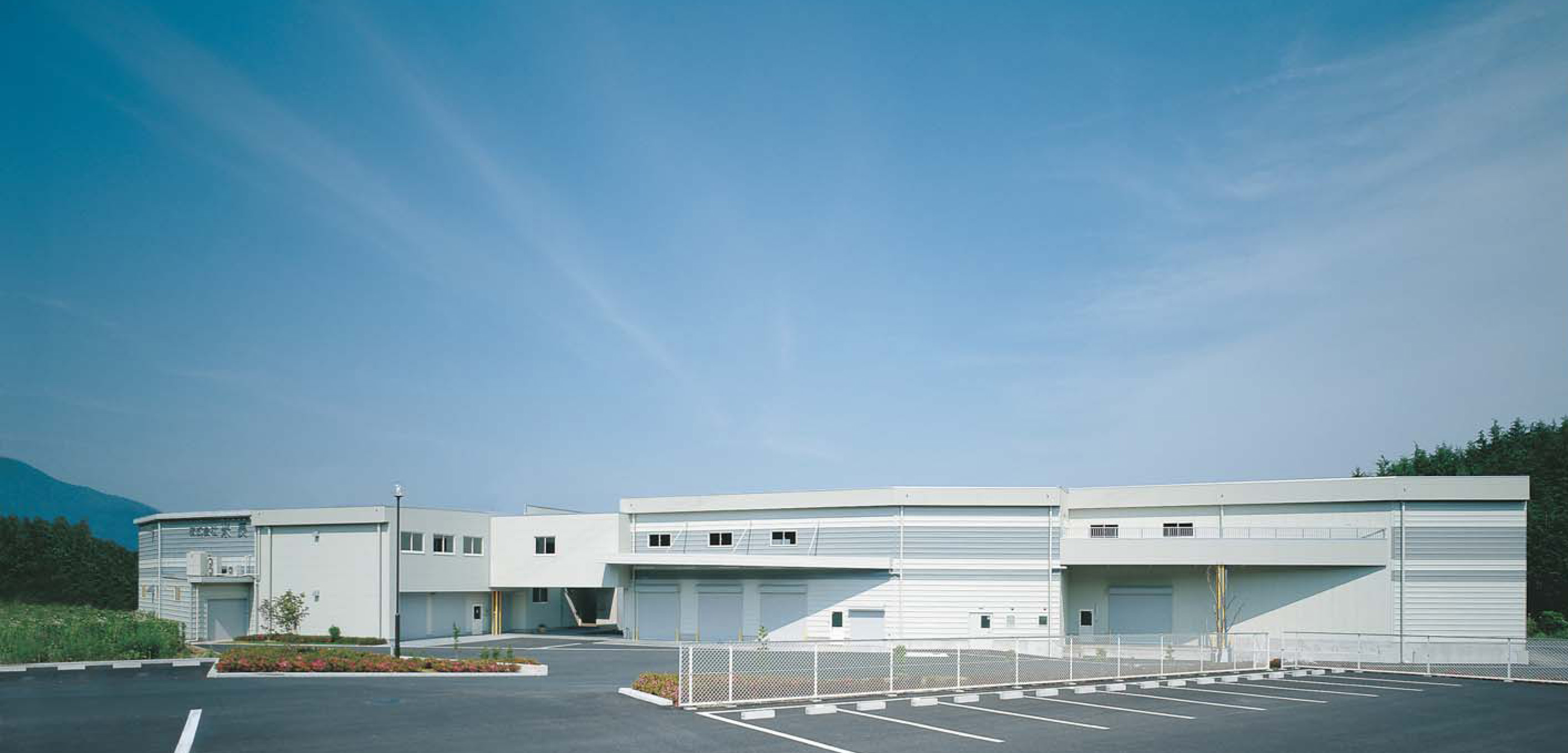 米長